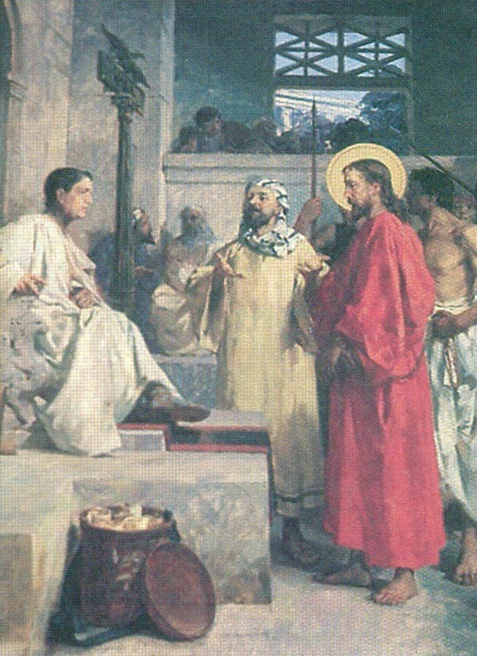 Paolo Gaidano (1861-1916): Gesù condannato a morte, tavola della Via Crucis (1883) nella Chiesa parrocchiale di Santa Maria Assunta, Fubine, Alessandria, Piemonte, Italia.